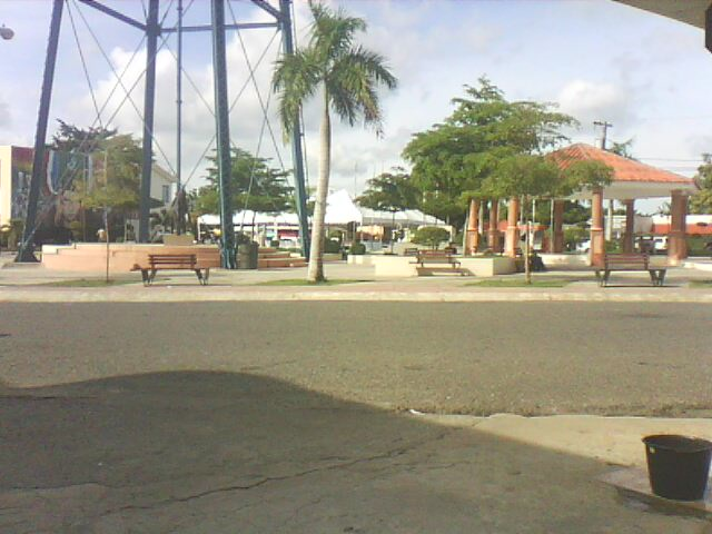 Parque Ayuntamiento de Monte Plata